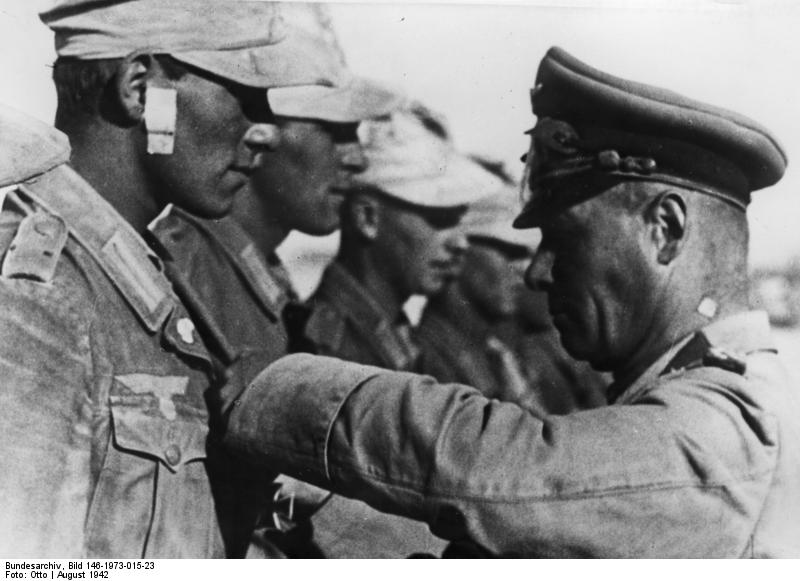 Generalfeldmarschall Rommel verleiht das E.K. [Eiserne Kreuz] an die Mitglieder seines Stabes. 31.8.42 PK-Aufnahme: Kriegsberichter Otto